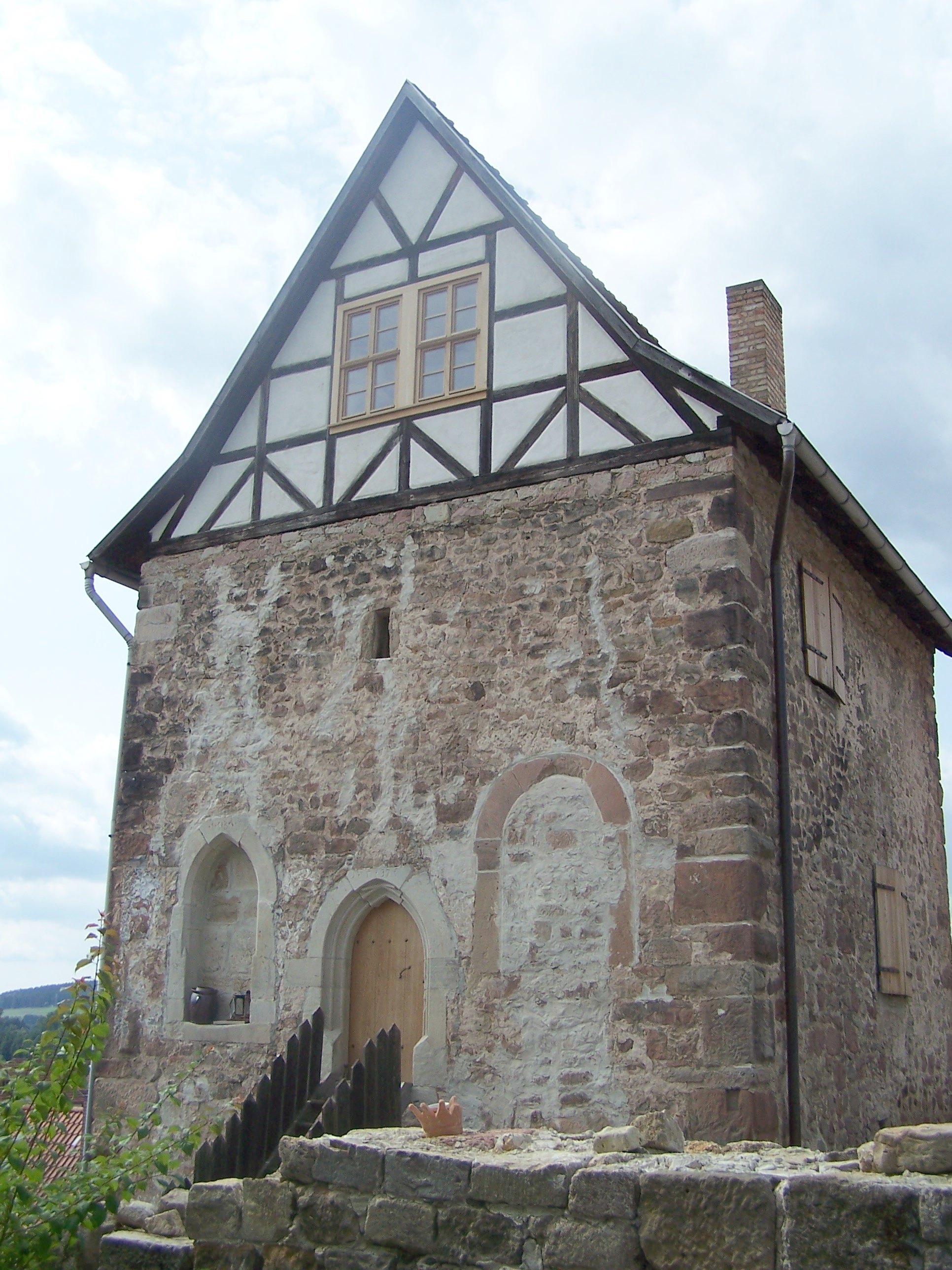 Ansichten und Details des als Kemenate bekannten mittelalterlichen Wohnturms in Schwallungen.